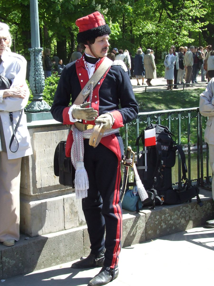 Towarzysz Kawalerii Narodowej z brygad Koronnych. Widok sylwetki z przodu. Widoczna czapka nowego wzoru, pas nowego wzrou z klamrą "bez orła", oraz nowe spodnie granatowe z karmazynowymi lampasami wprowadzone na miejsce karmazynowych z białymi lampasami. Szabla podpięta na króczku mosiężnym do służby pieszo. Szabla i temblak XX-wieczne. Zwraca uwagę fryzura "włosy krótkie, do pół kołnierza", jak to okresla przepis i rekawiczki (tak mówi przepis - nie rękawice) bez klap (czyli sztylpów) włożone regulaminowo za pas z prawej strony. Na zdjęciu pan Piotr Mirosław Zalewski z Arsenał – Stowarzyszenie Regimentów i Pułków Polskich 1717-1831 Łazienki Królewskie, Warszawa